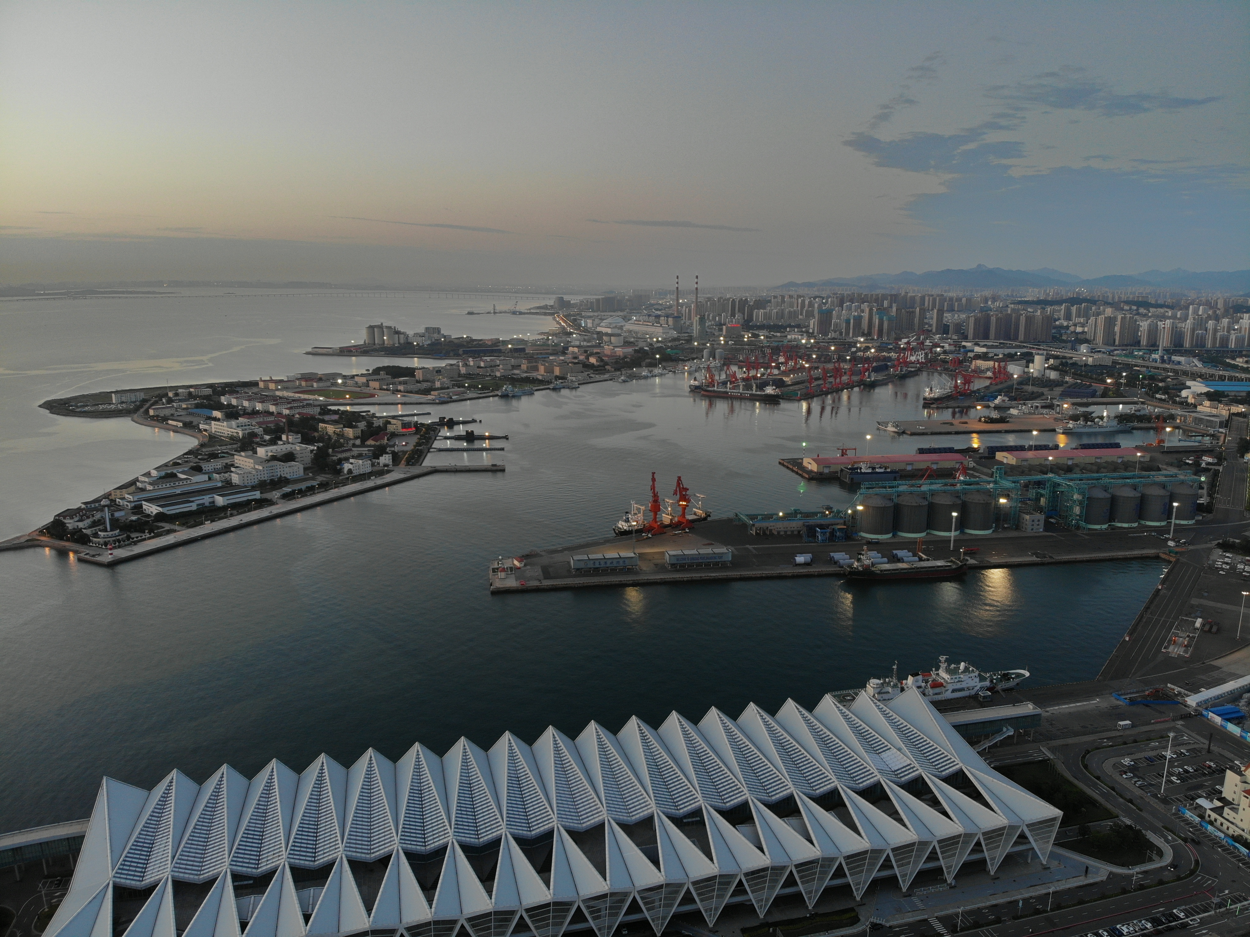 青岛港大港